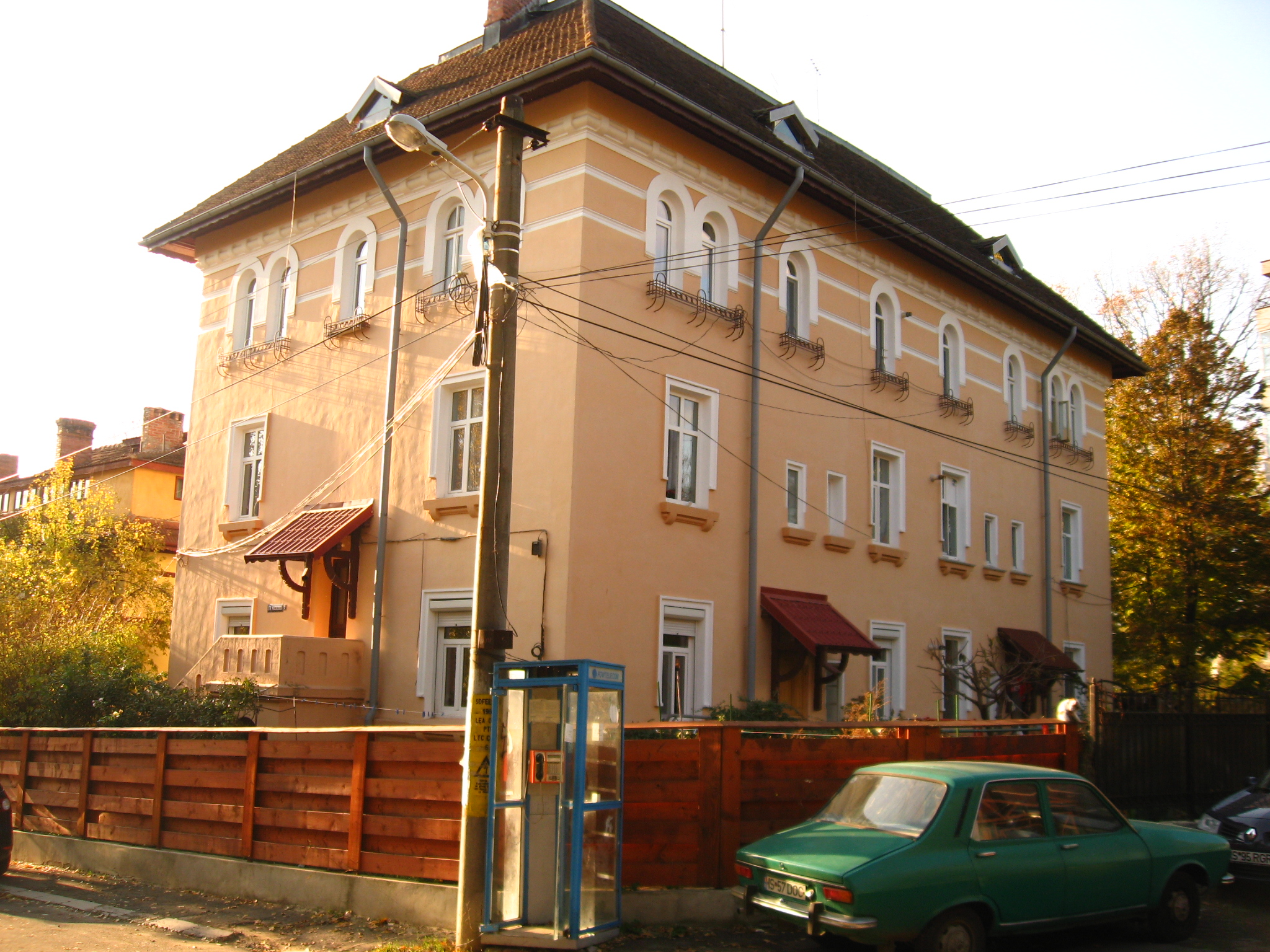 Ansamblul urbanistic de locuințe "Pavilioanele C.F.R."- 15 clădiri